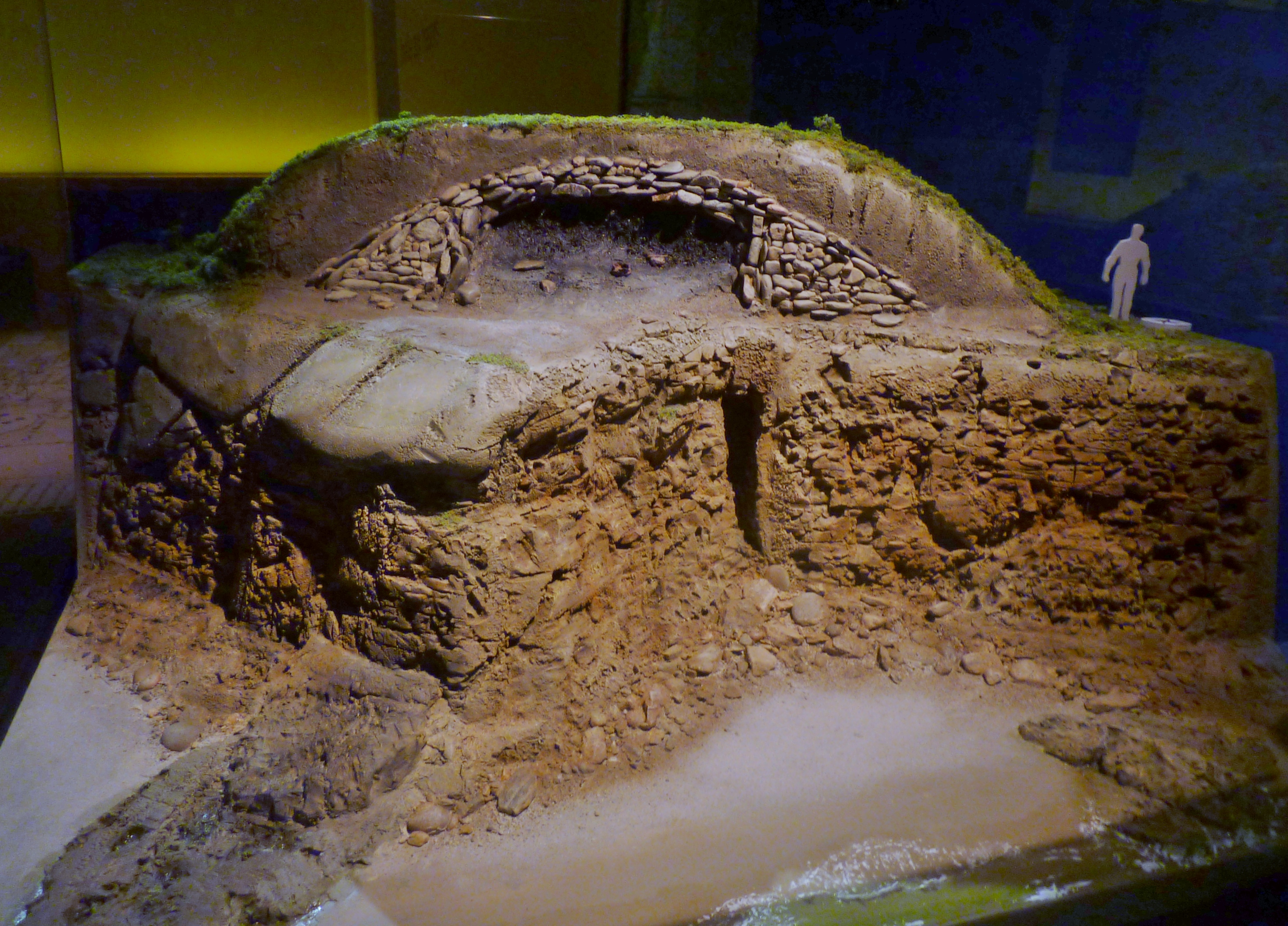 La tombe viking de l'Île de Groix (exposition port-musée de Douarnenez en 2013) : reconstitution